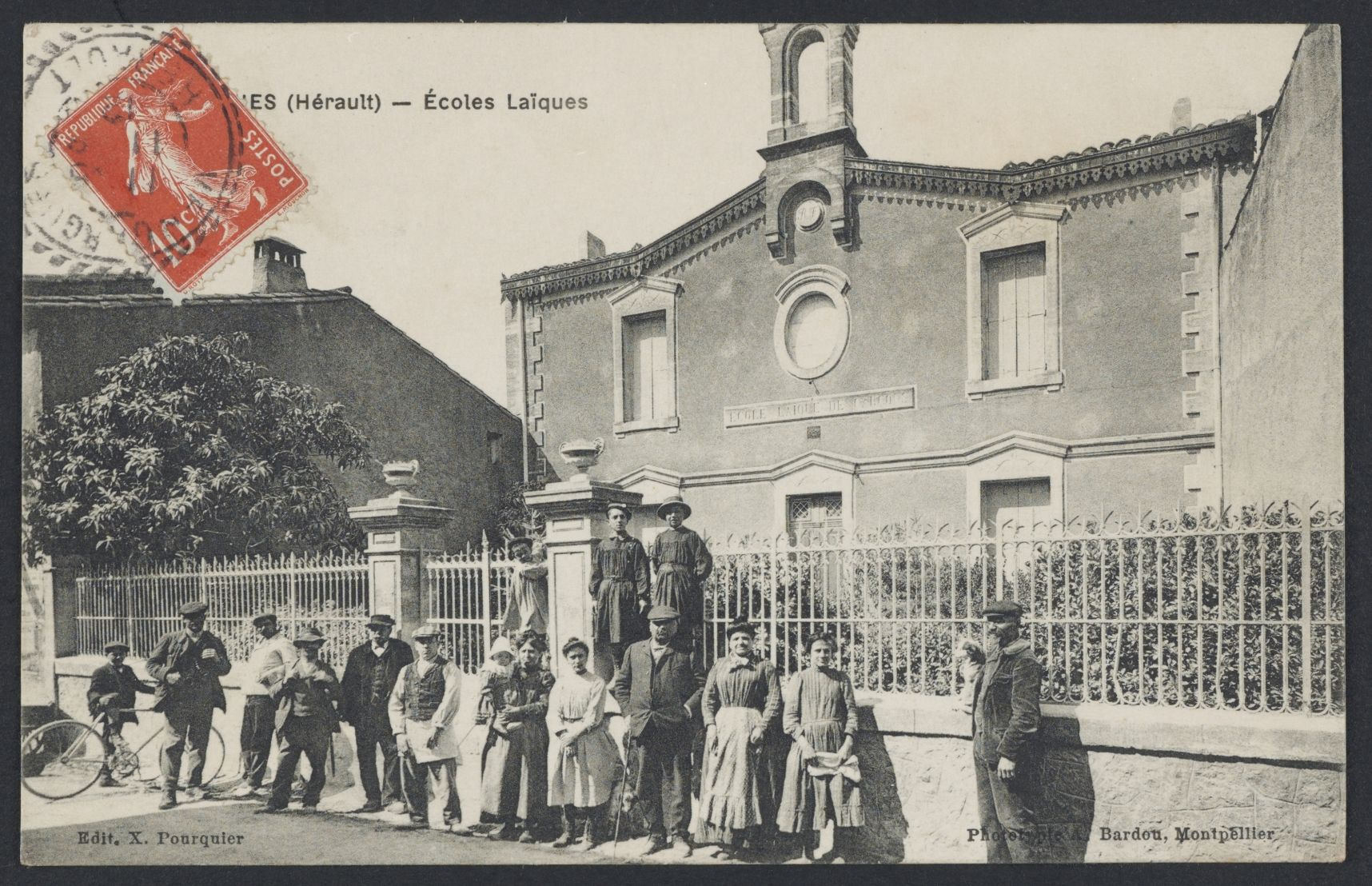 Vendargues. - Ecoles laïques : carte postale.